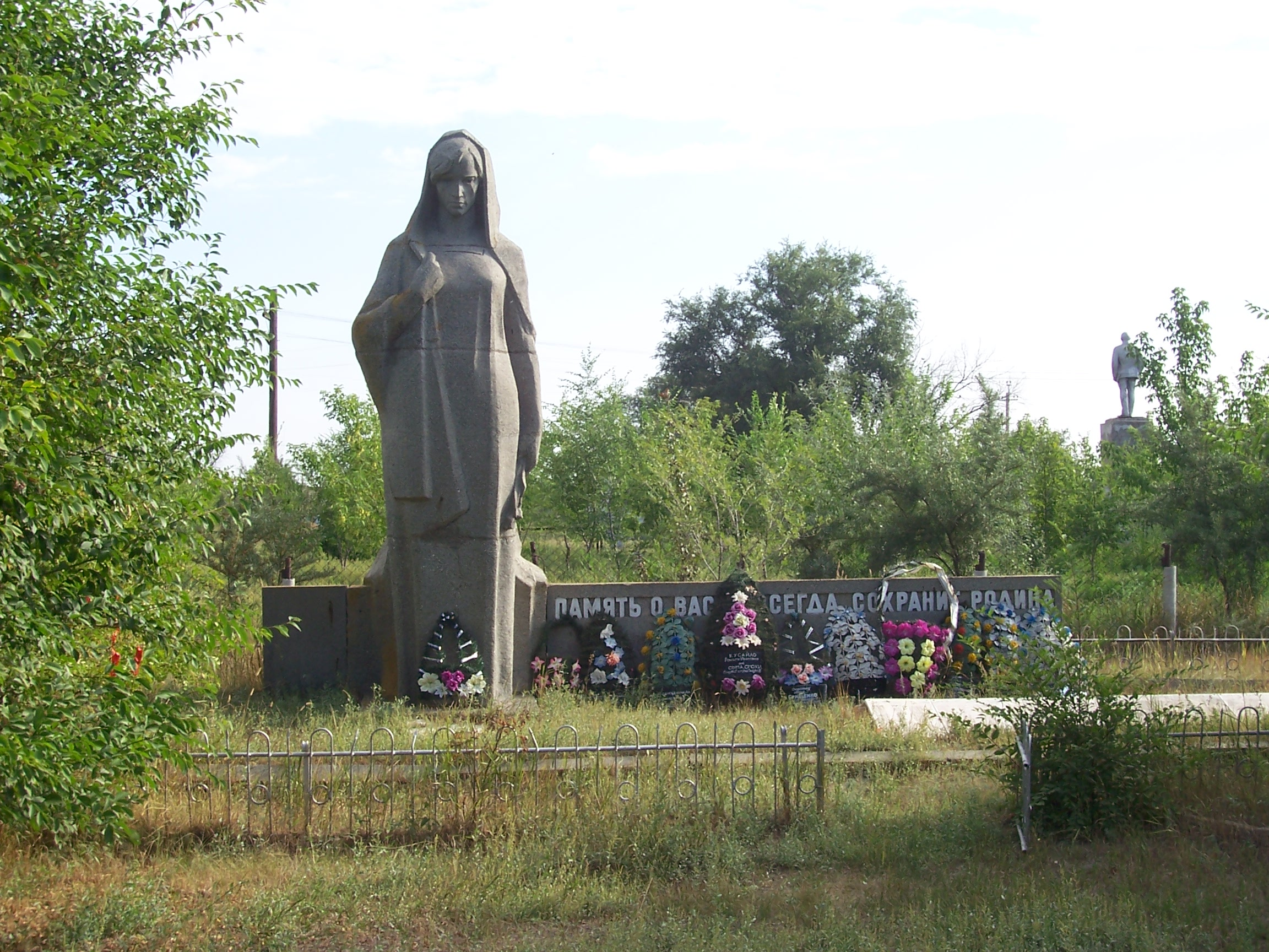 Мемориал «Скорбящая мать» в центре села Харьковка, памяти односельчанам, погибшим в Великой Отечественной войне